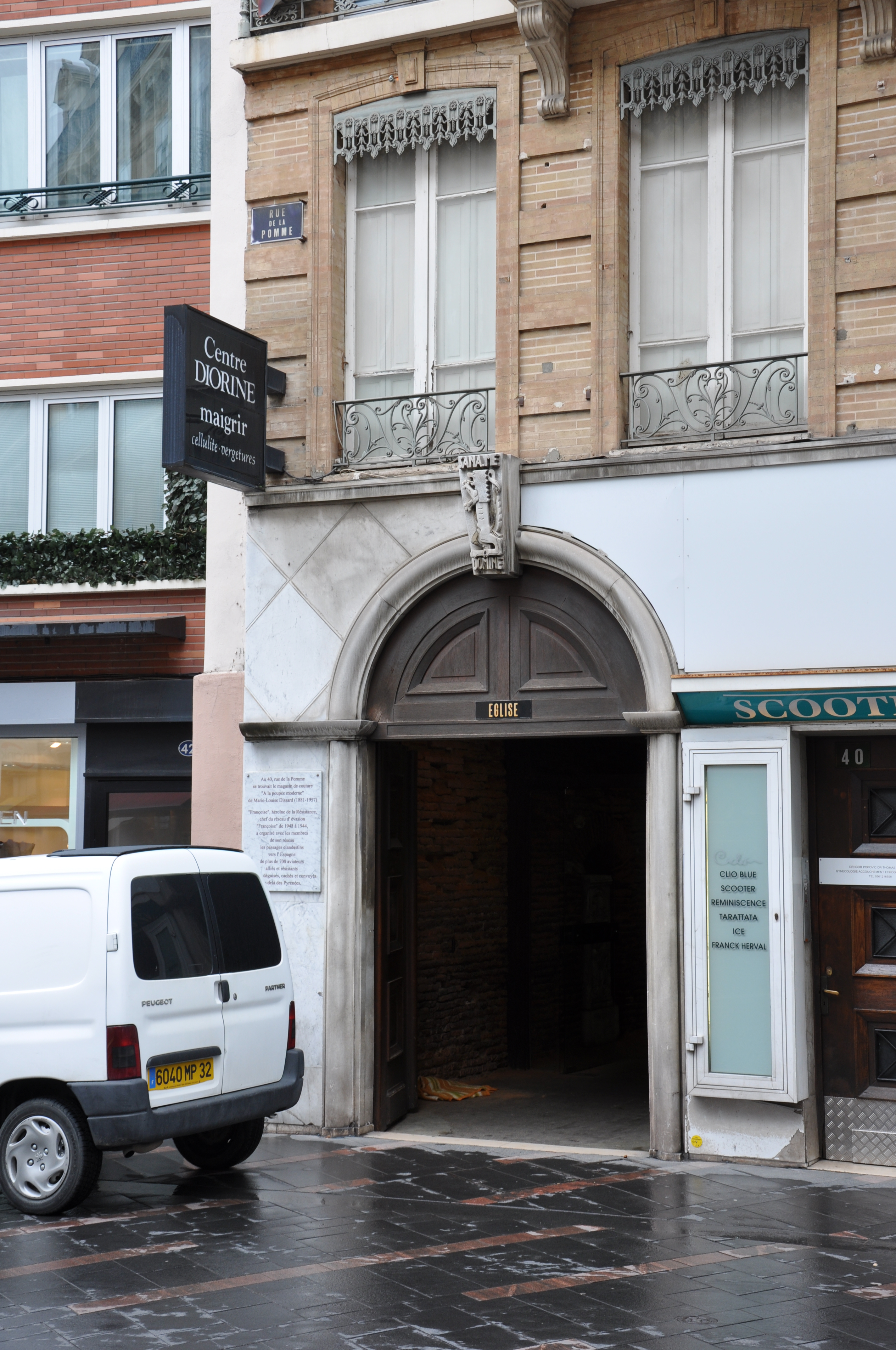 40 Rue de la Pomme, Toulouse, Midi-Pyrénées, France